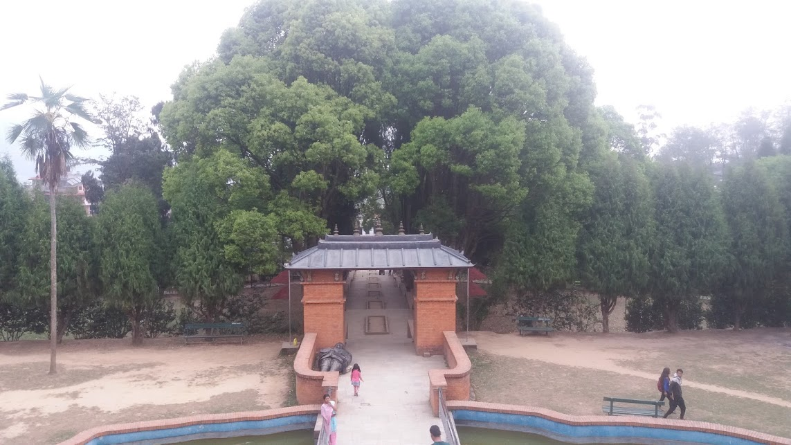 नेपाली: त्रिभुवन पार्क